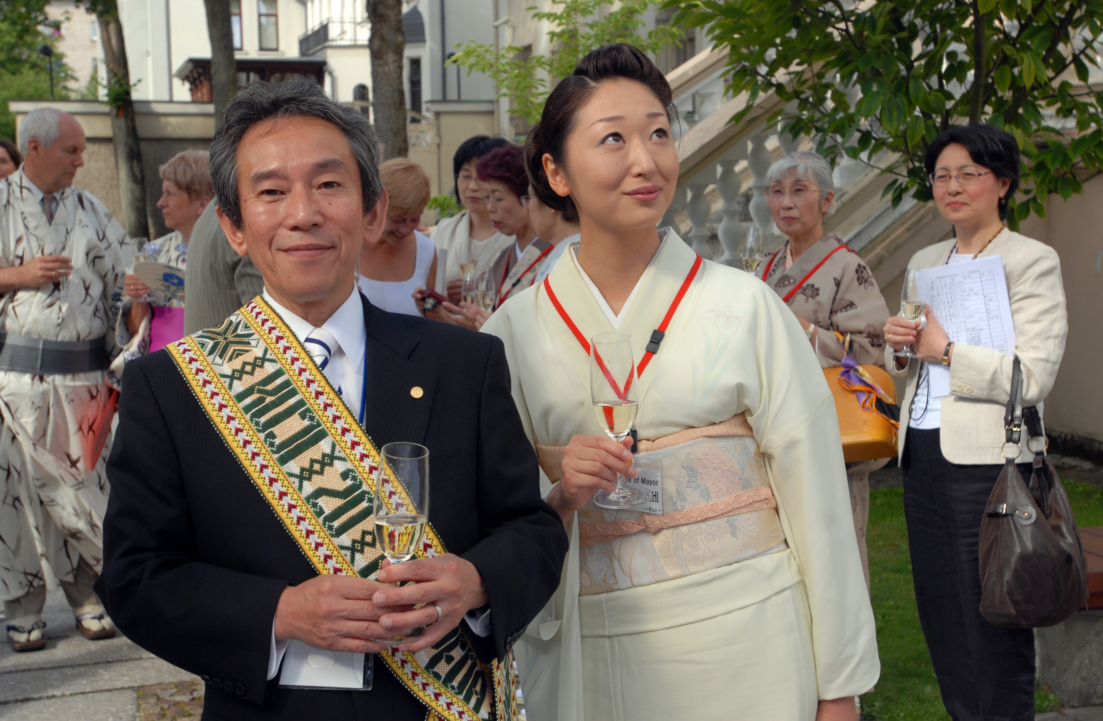 Takafumi Jamauči (山内隆文), starosta města Kudži (久慈, Japonsko) na návštěvě v Klaipėdě s chotí Nanae Jamauči (山内七恵) 31. 7. 2009Lietuvių: Takafumi Jamauči (山内隆文), Kudži (久慈, Japonija) miesto meras su žmona Nanae Jamauči (山内七恵) 2009-07-31 d. Klaipėdoje